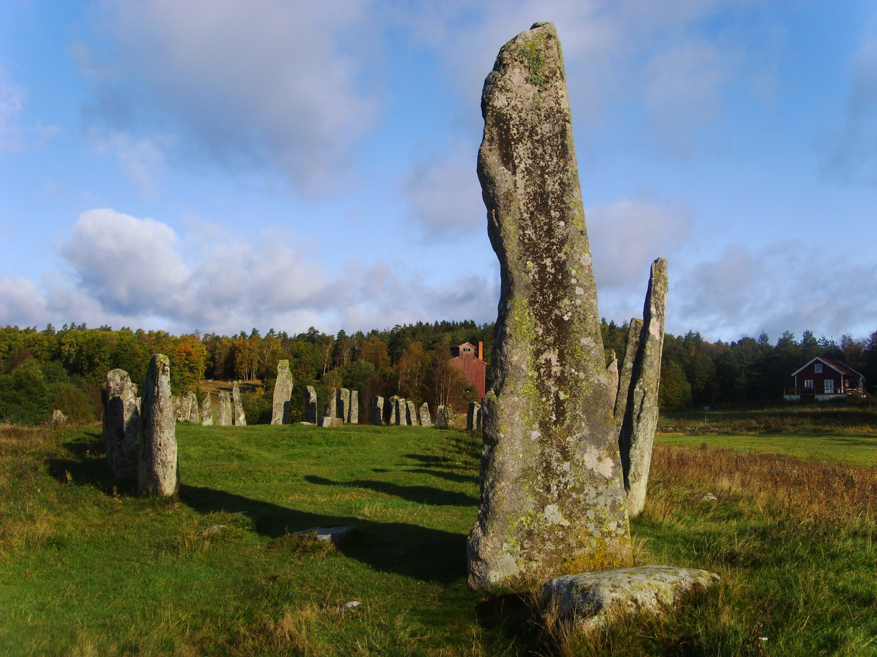 Blomsholm är ett fornlämningsområde i Strömstads kommun, med Sveriges tredje största skeppssättning, Bohusläns största domarring, högar och stensättningar från järnåldern. Från platsen är också knutet berättelser från Karl XII: s fälttåg mot Norge på 1710-talet.